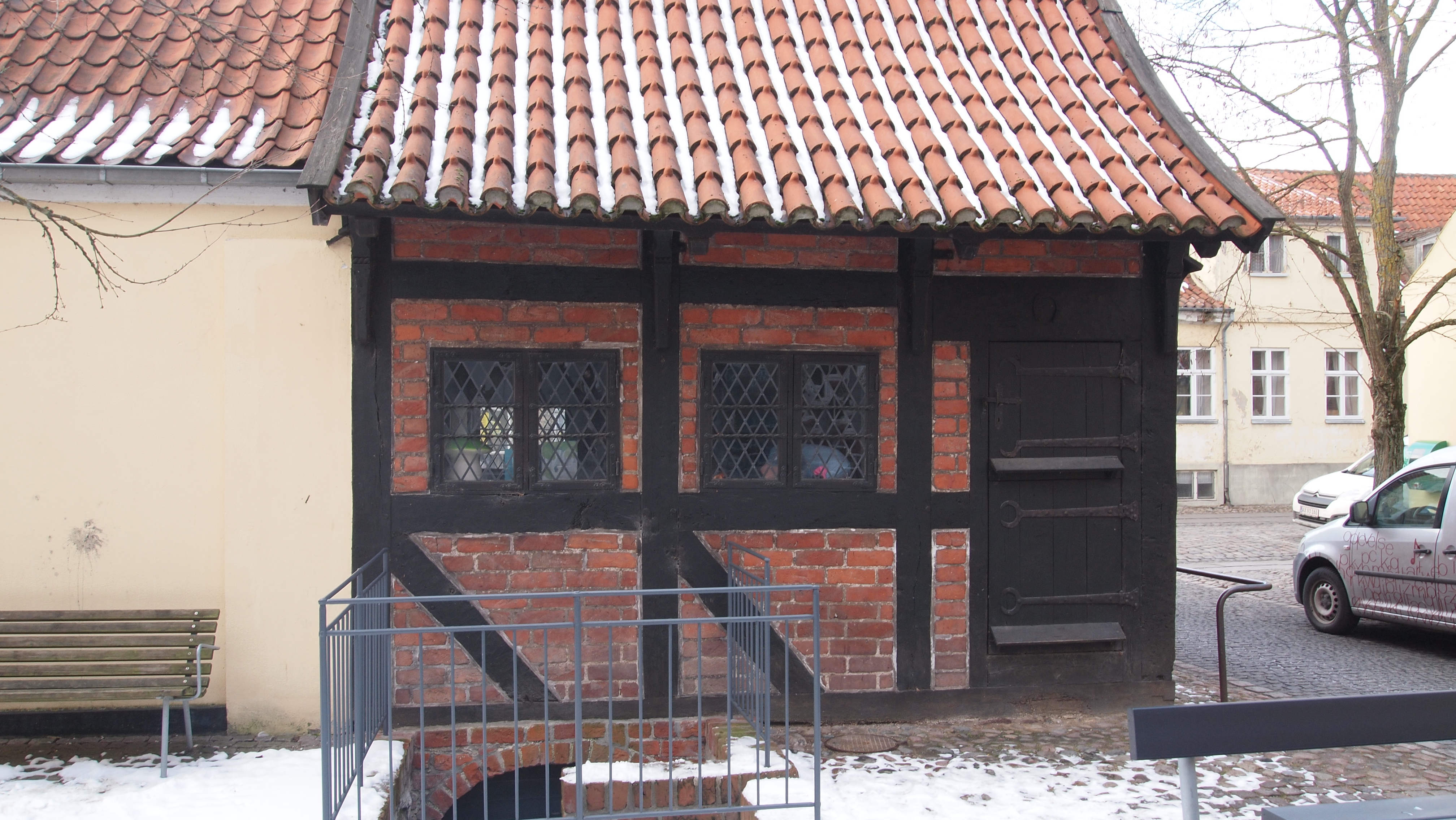 Bagsiden af Kirkestræde 20